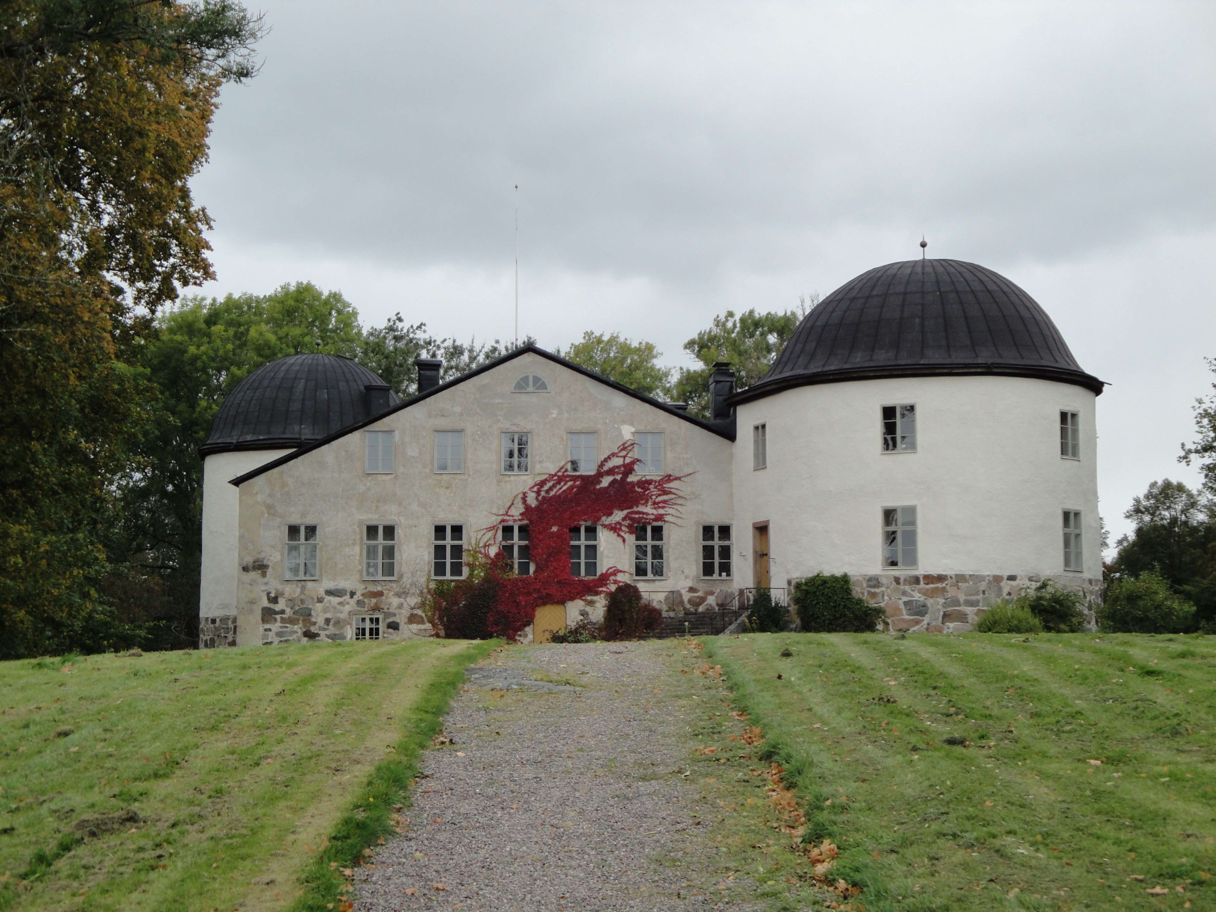 Penningby slott i Norrtälje kommun.